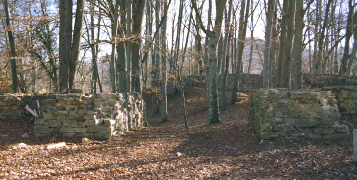 Wehranlage Sissacherfluh, Sissach, Eingangstor von innen